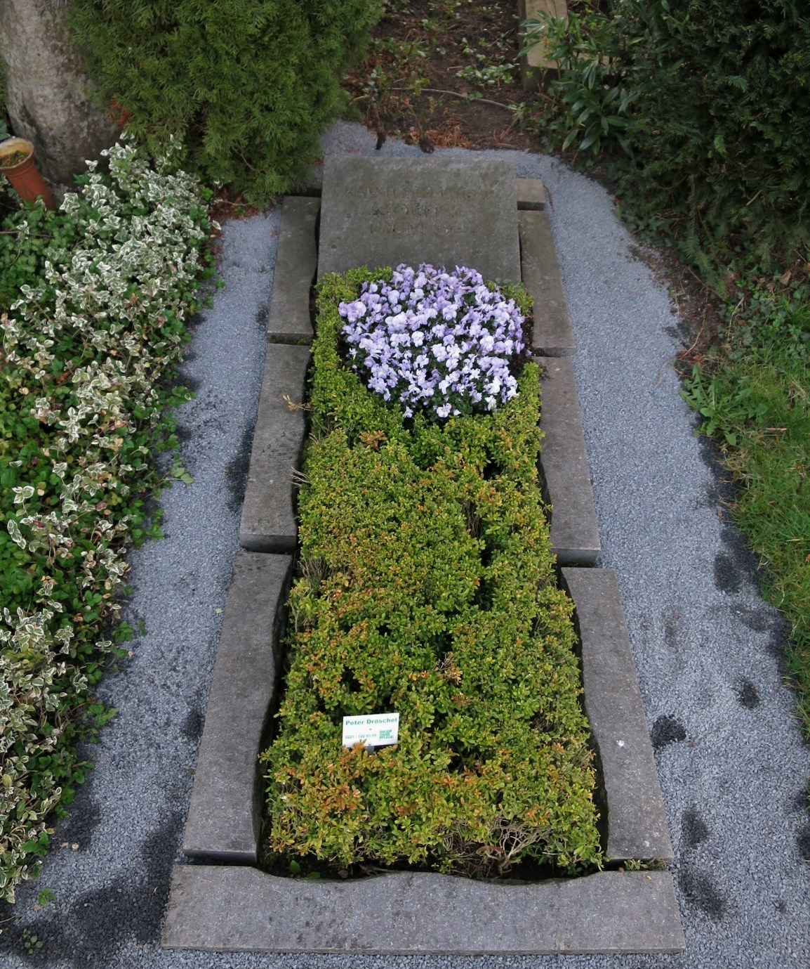 Raimund Girke - Grab auf Friedhof Melaten